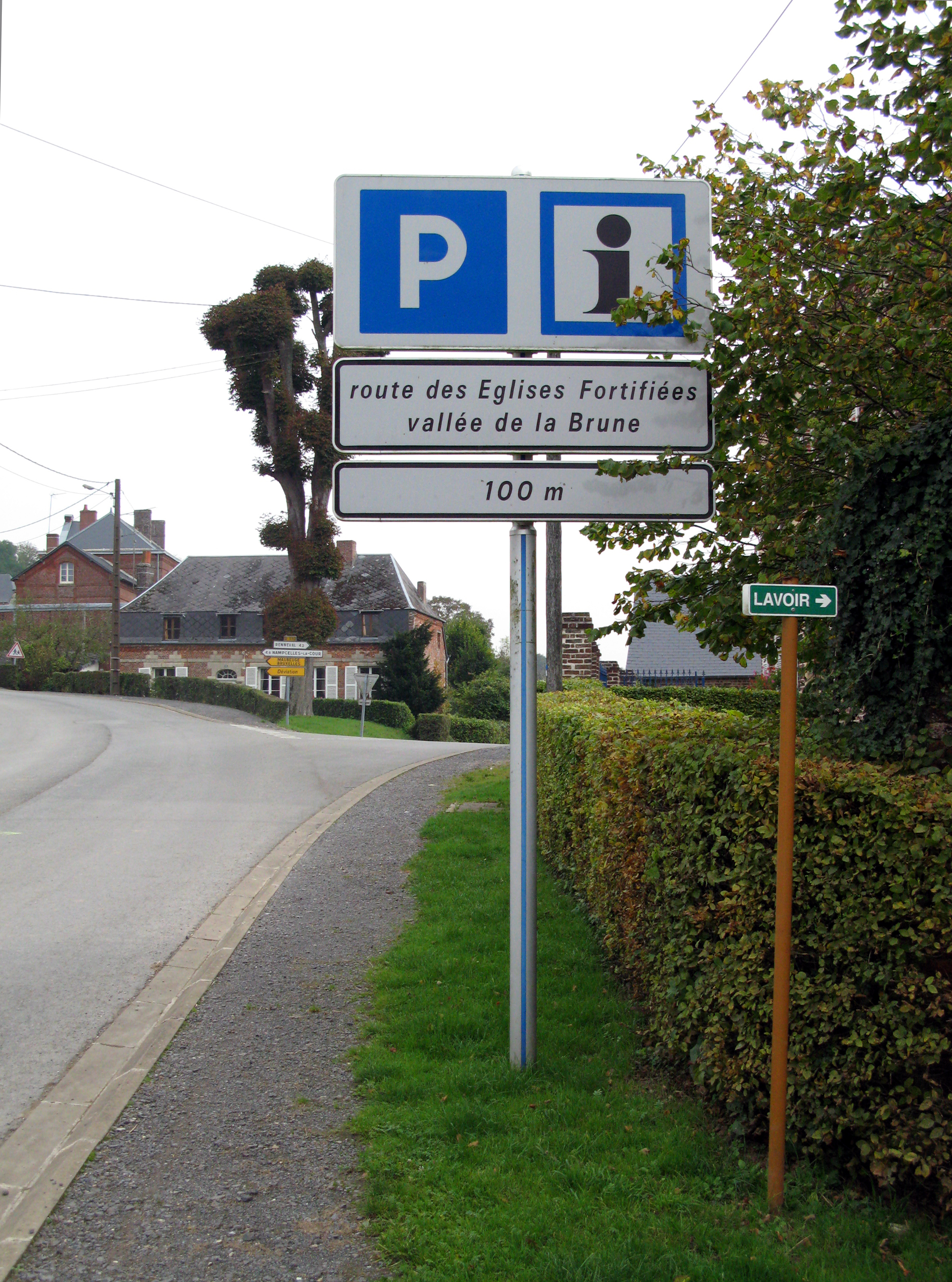 Vigneux-Hocquet (Aisne, France) - Panneau informatif : route touristique (Circuit des églises fortifiées de la vallée de la Brune). De l'autre côté de la rue se dresse l'église entourée de son cimetière.